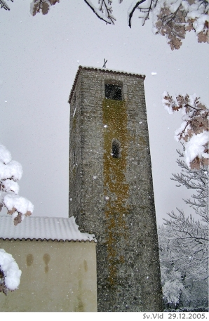 Crkva Svetog Vida